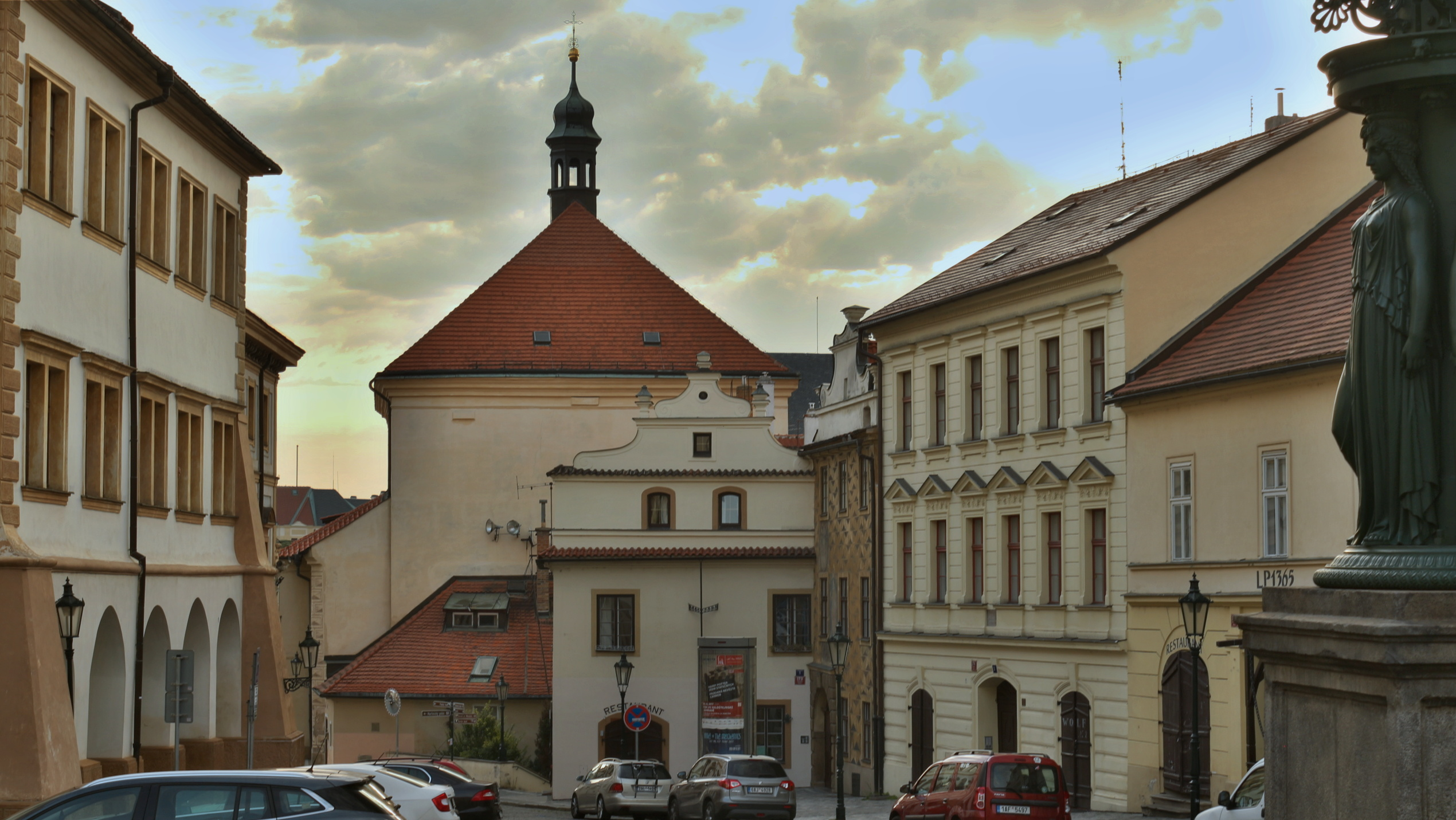 Klášter bosých karmelitánek s kostelem sv. Benedikta na Hradčanech v Praze